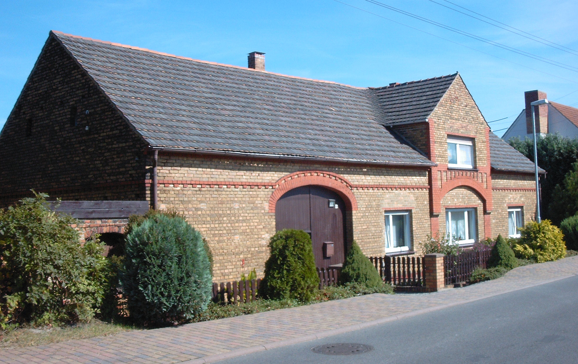 Typisches Wohnhaus eines Drei- oder Vierseitenhofes der Schleifer Region, in Trebendorf aufgenommen